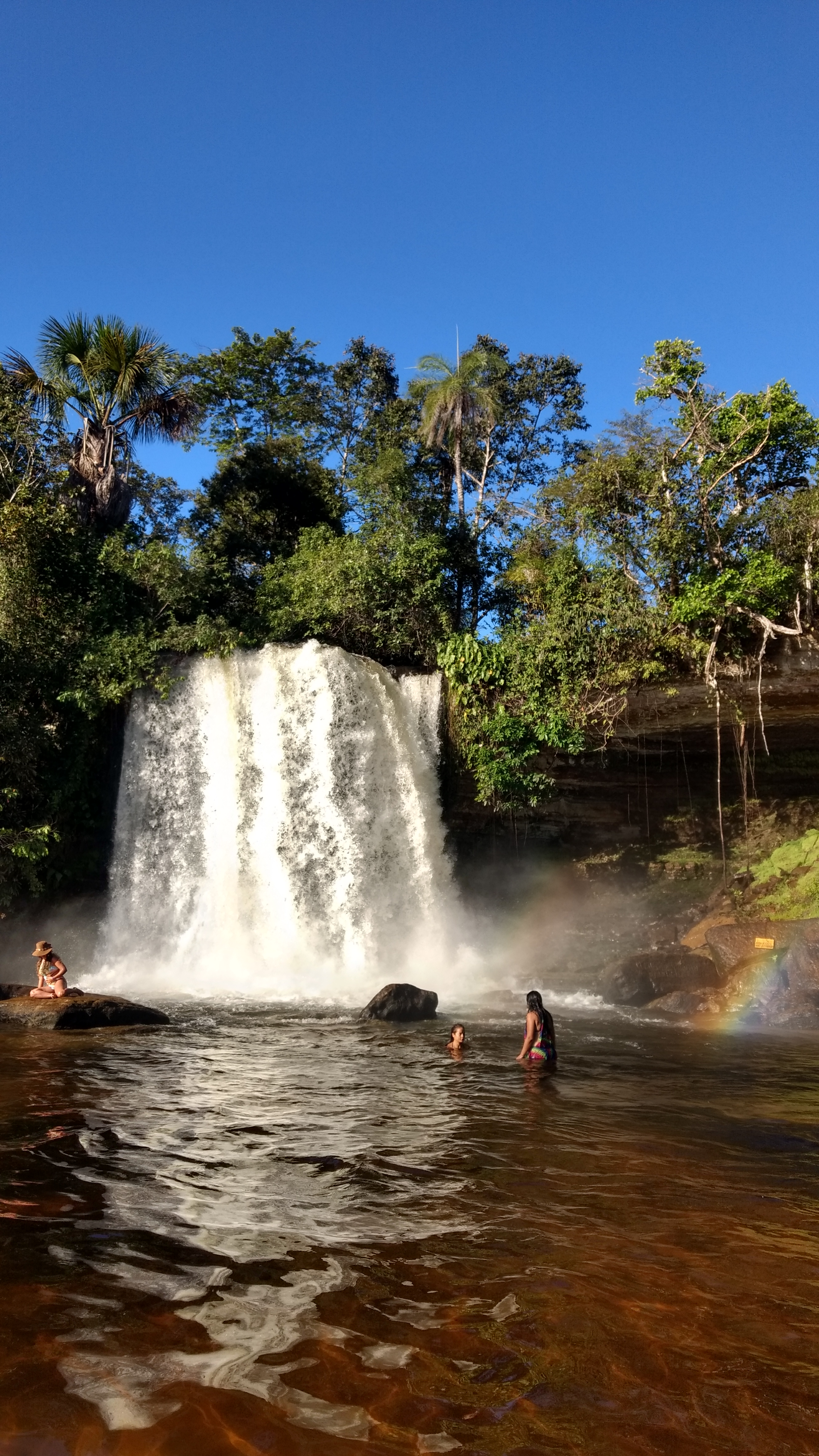 Cachoeiras de Itapecuru, Carolina - Maranhão